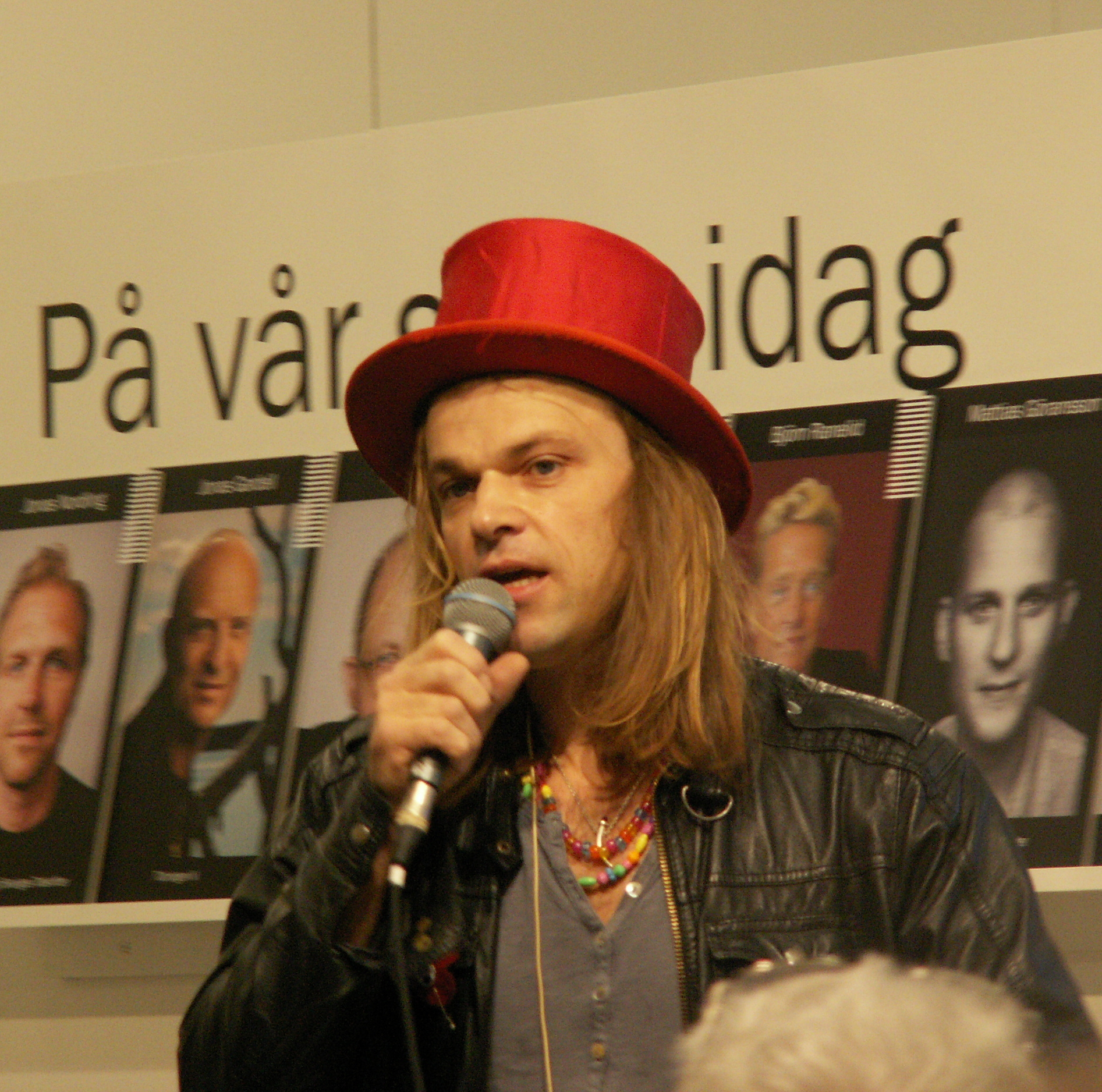 Carl-Einar Häckner på Bokmässan 2012 i Göteborg.